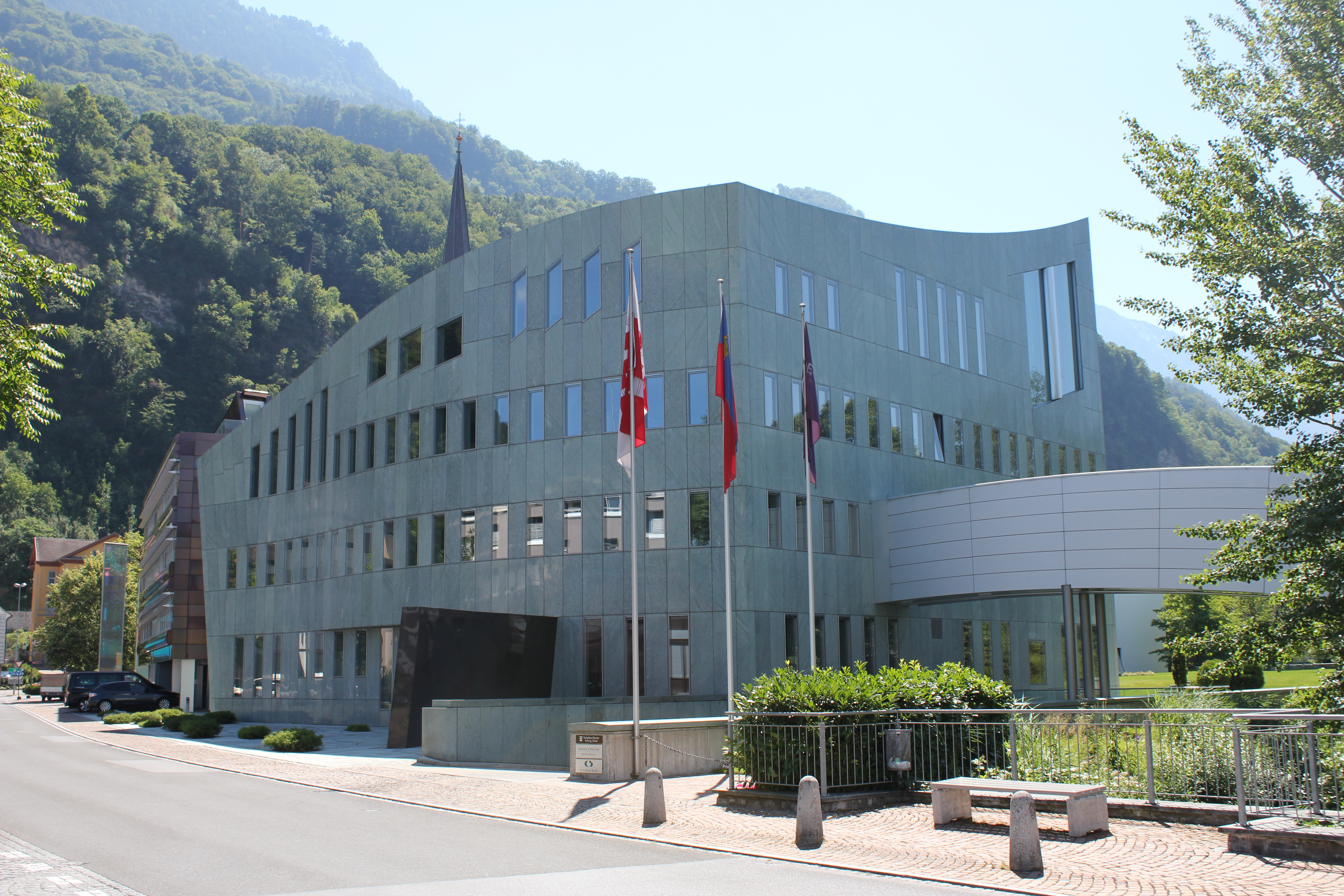 Centrum Bank, Vaduz, Liechtenstein